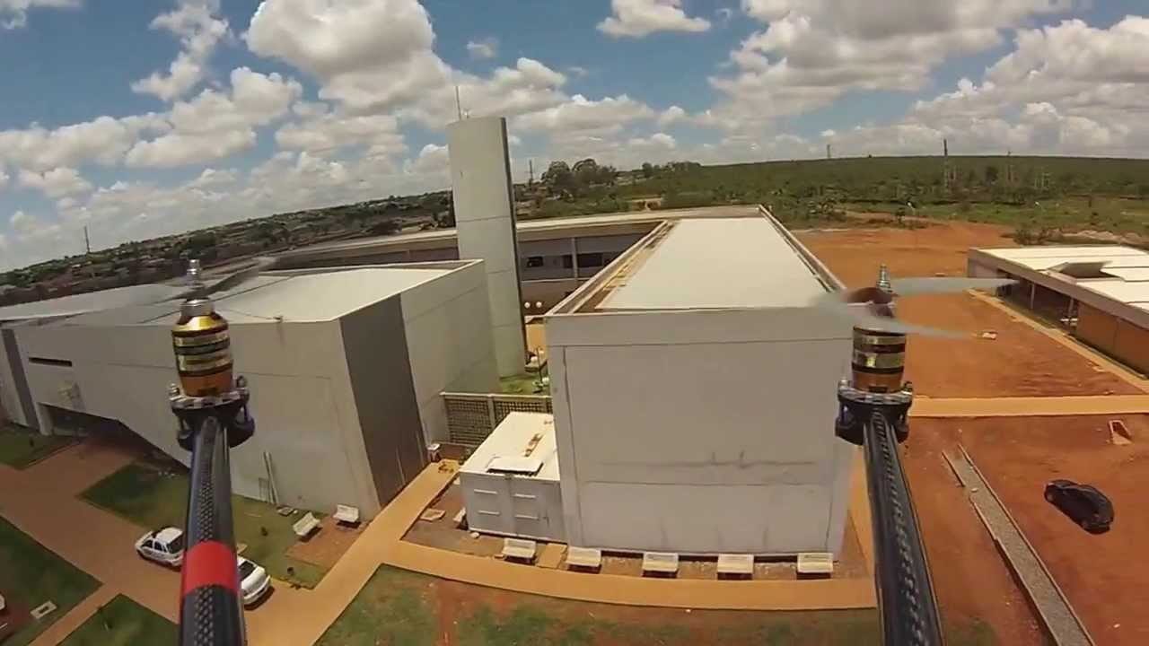 Imagem feita por um drone na UNB.